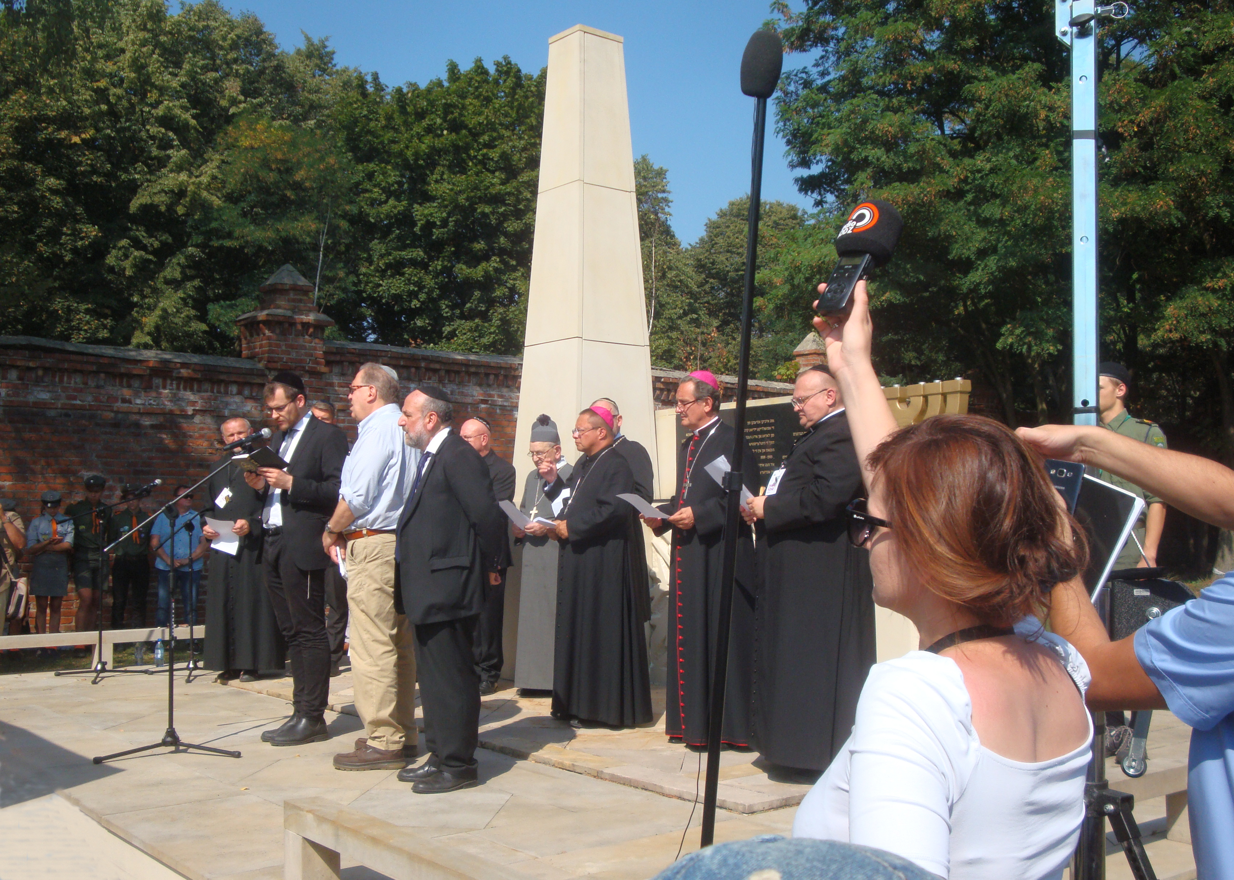 Modlitwa ekumeniczna na cmentarzu żydowskim podczas rocznicy 75 lat likwidacji Litzmannstadt Getto rabin Michael Schudrich rabin Dawid Szychowski i arcybiskup Grzegorz Ryś fot M Z Wojalski